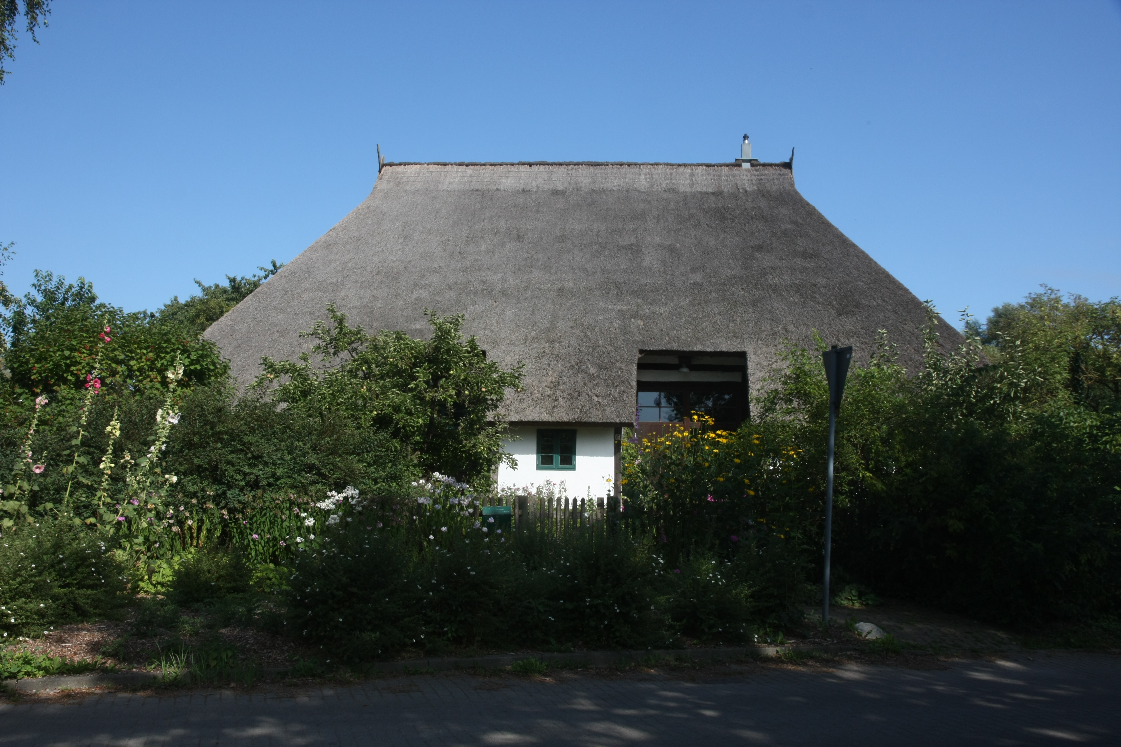 Alte Dorfstraße 6, Pölchow (Baudenkmal)